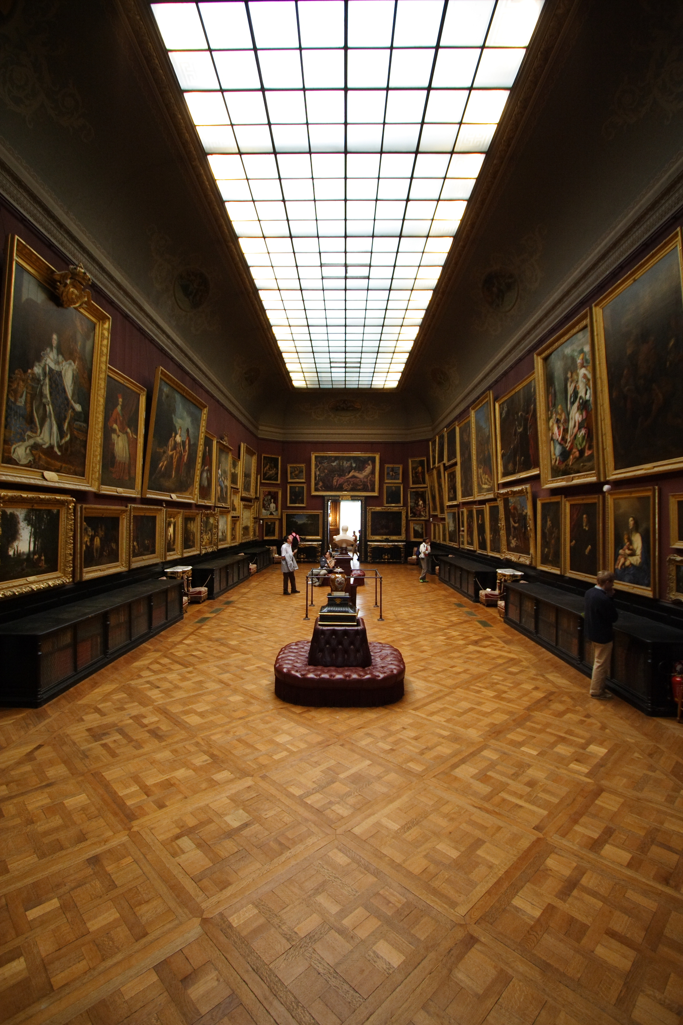 Musée Condé(Chantilly, France)